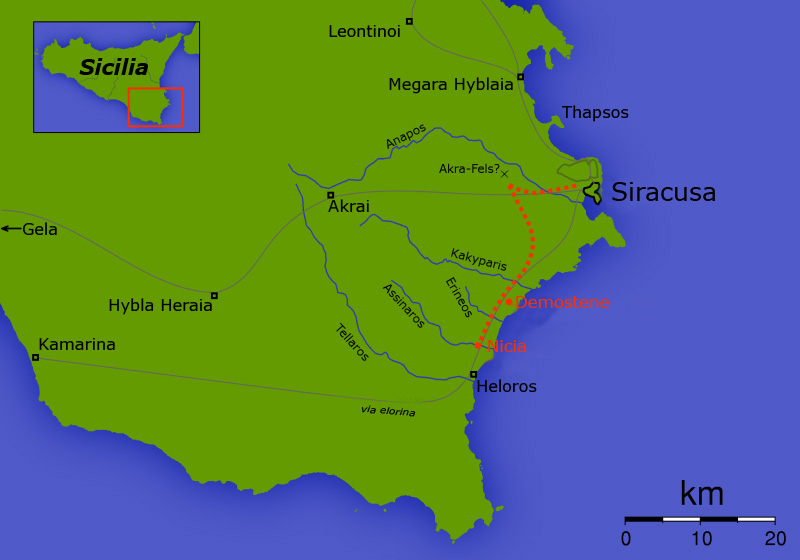 Fine della spedizione ateniese e cattura di tutti i soldati